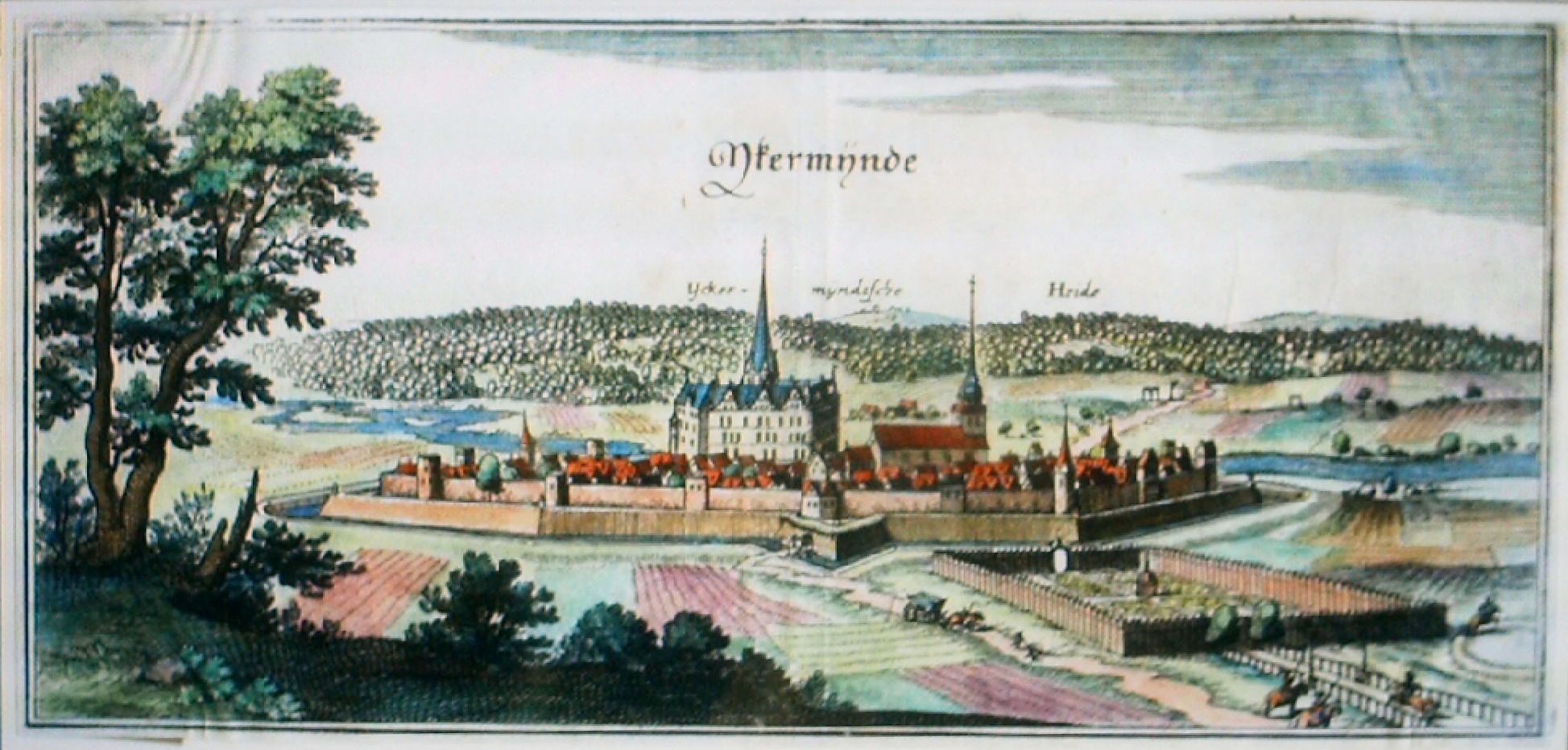 Ansicht von Ueckermünde aus dem 17.Jh.